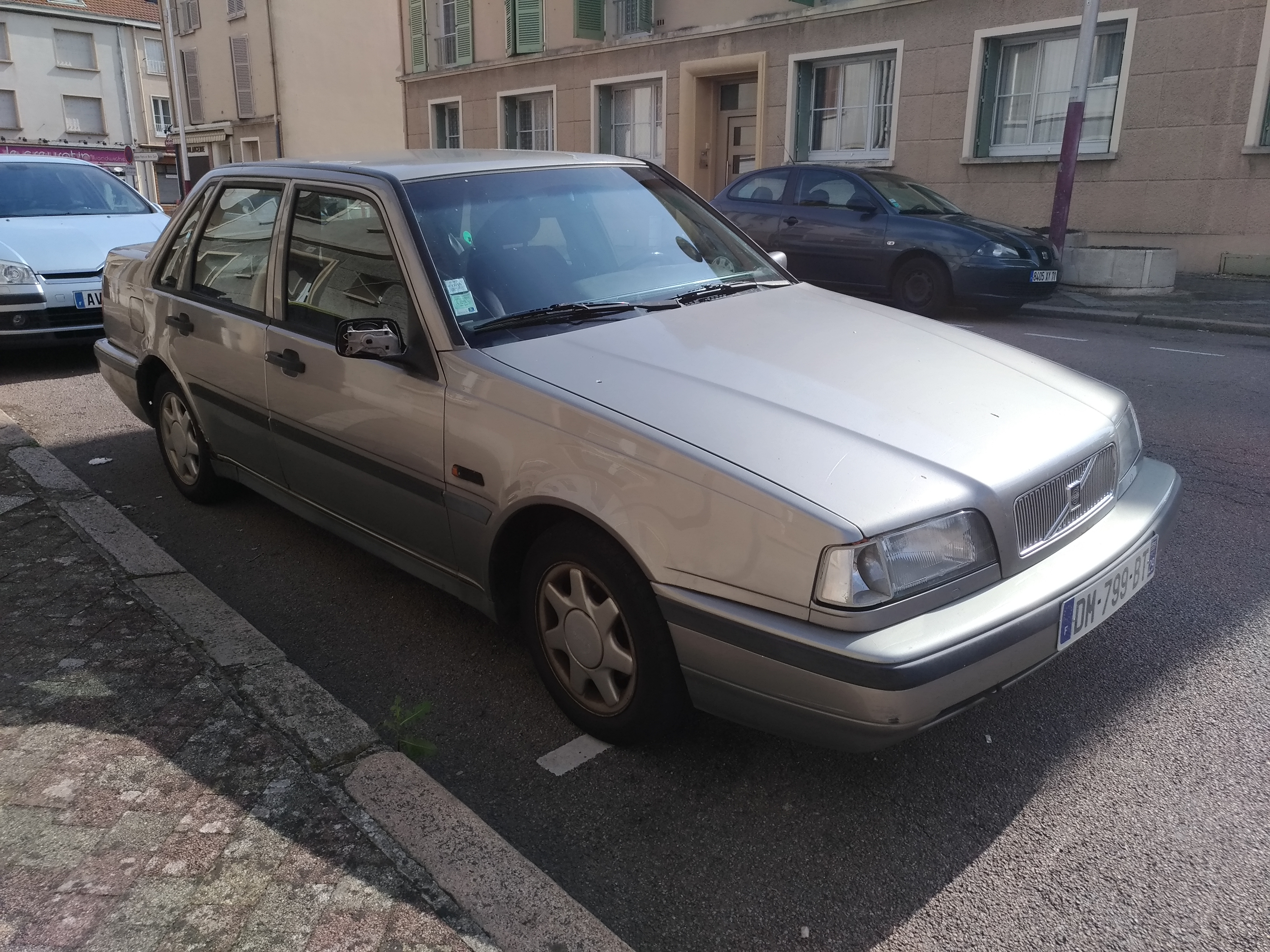 1994 Volvo 460 gle (1.8 90 hp) at Le Creusot